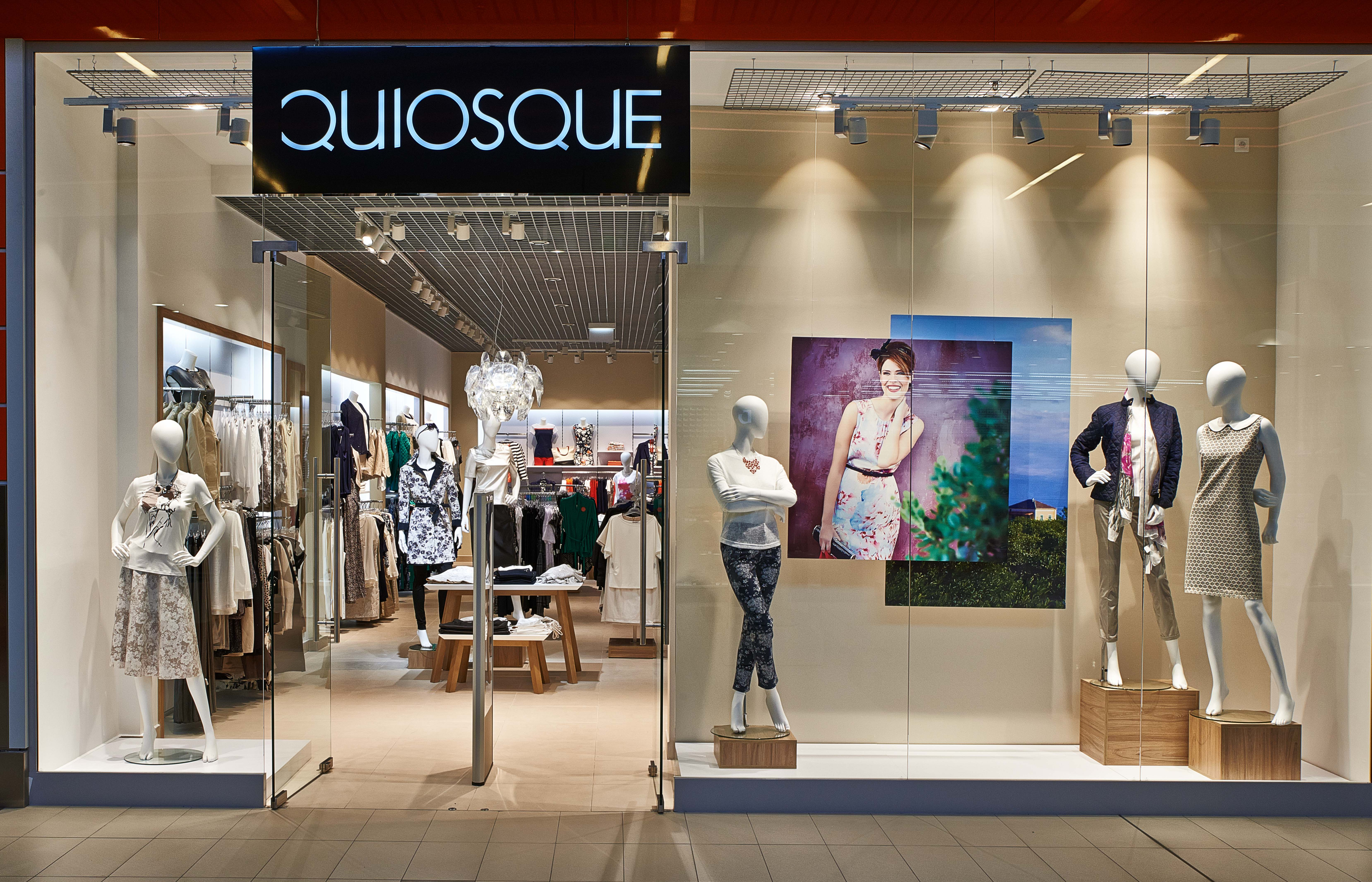 Witryna główna salonu Quiosque w galerii handlowej Łomianki.